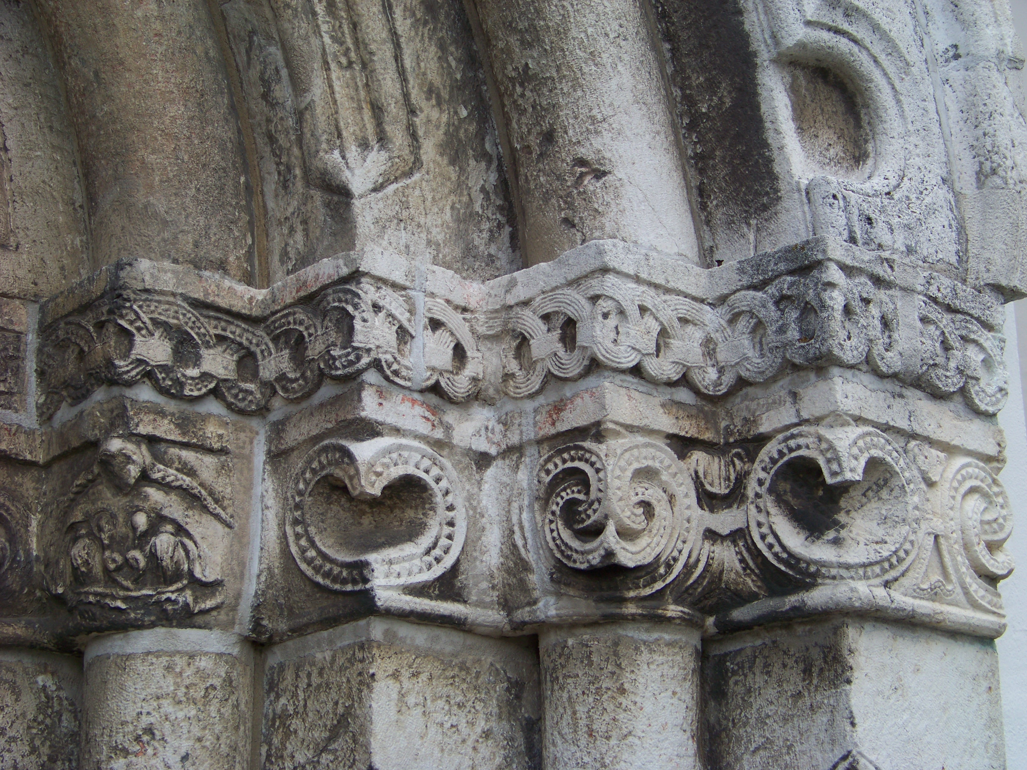 Mallersdorf-Pfaffenberg, Klosterberg 2. Katholische Pfarrkirche, ehemalige Klosterkirche St. Johannes Evangelist. Türme, Langhauskern und Westportal vor 1265, Chor 1463, wesentlicher Umbau 1613, Vorbau um 1755. Kämpferfries aus der 1. Hälfte des 13. Jahrhunderts.